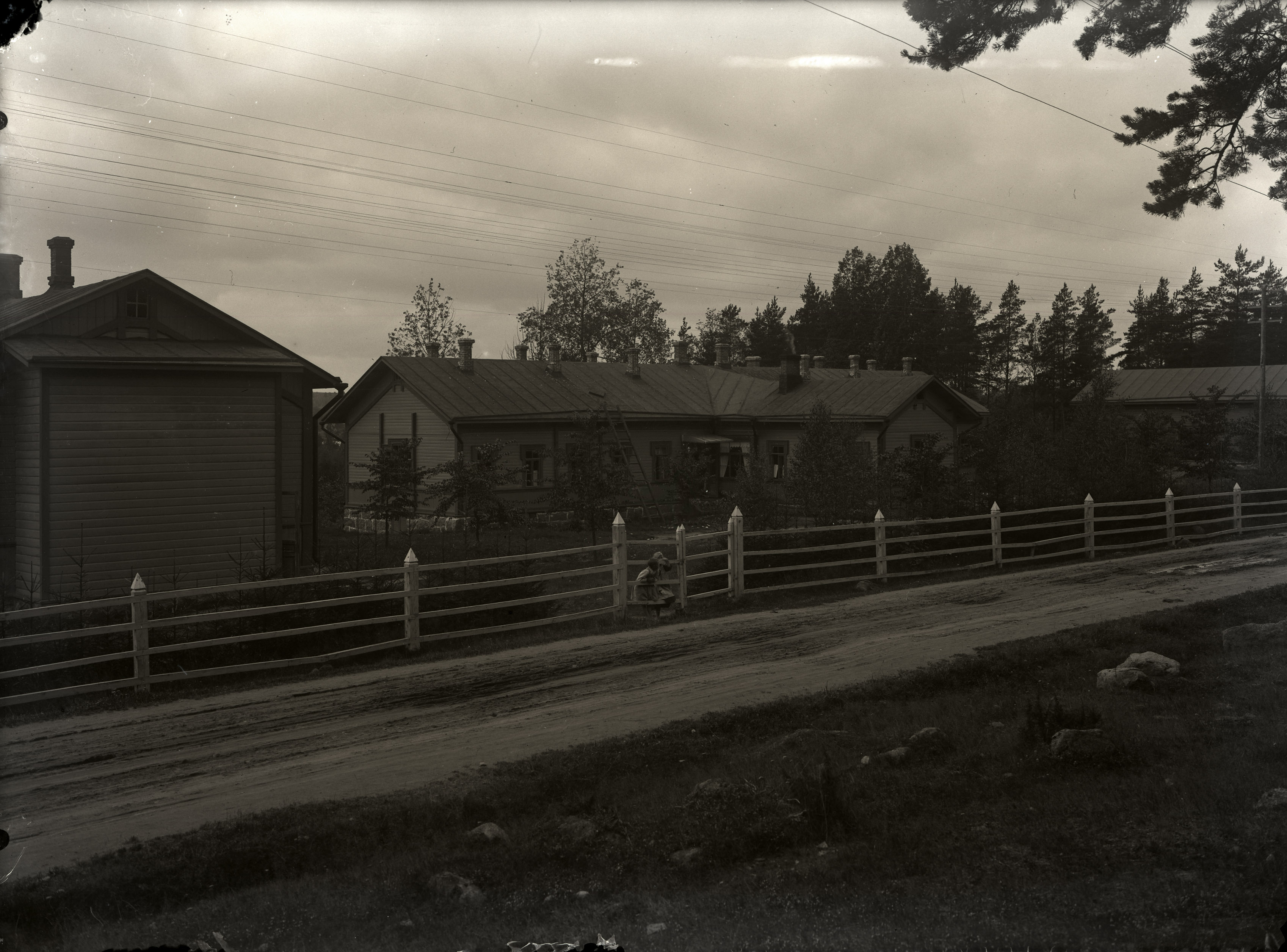 Iisalmi